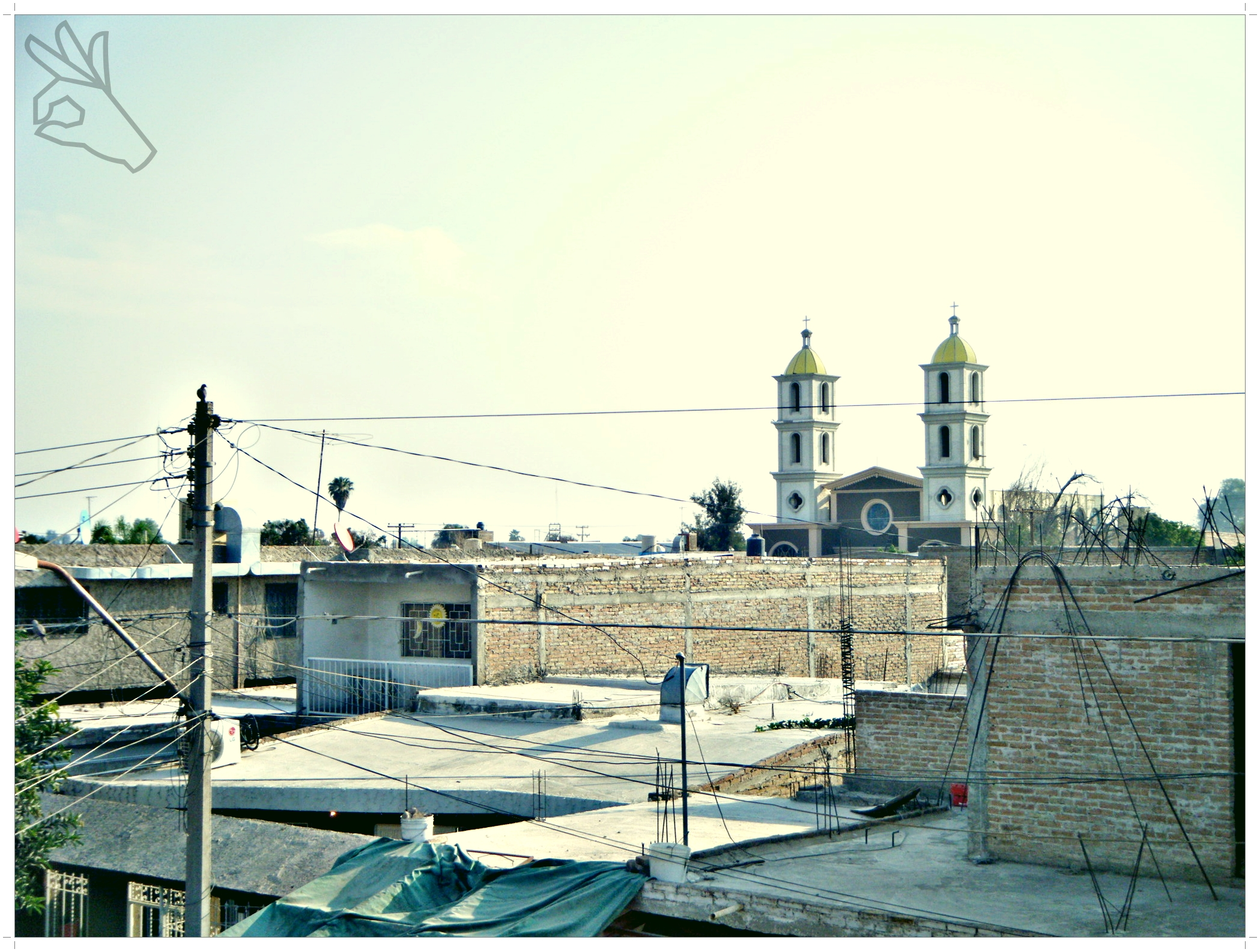 localización de la antigua hacienda de santa rosa